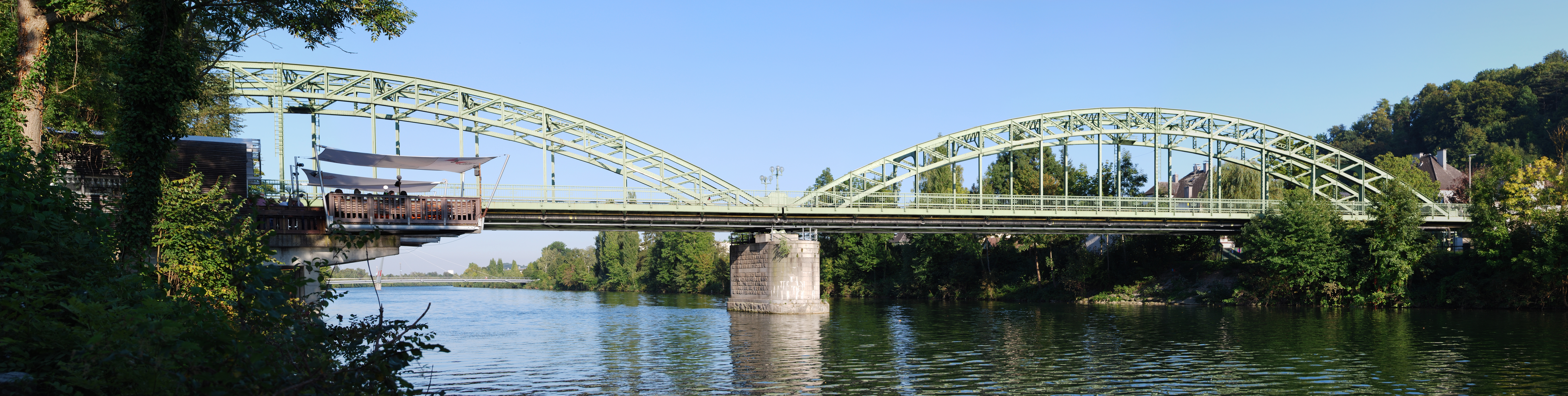 Die Alte Traunbrücke bei Wels, Oberösterreich.